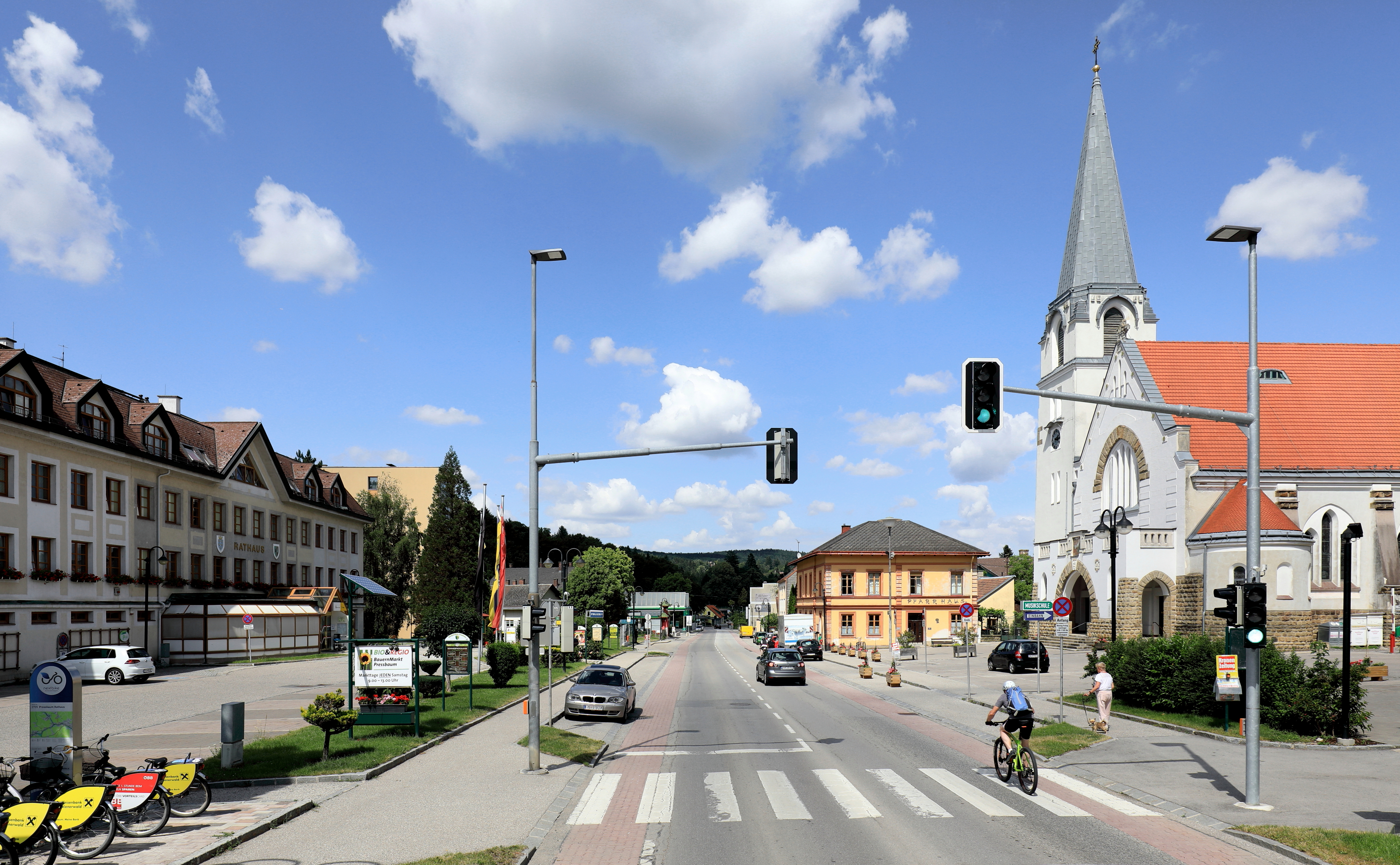 Ortskern der niederösterreichischen Stadtgemeinde Pressbaum mit dem 1964 fertiggestellten Rathaus (links), der von 1906 bis 1908 errichteten röm.-kath. Pfarrkirche (rechts) und links von dieser der 1881 errichtete Pfarrhof.